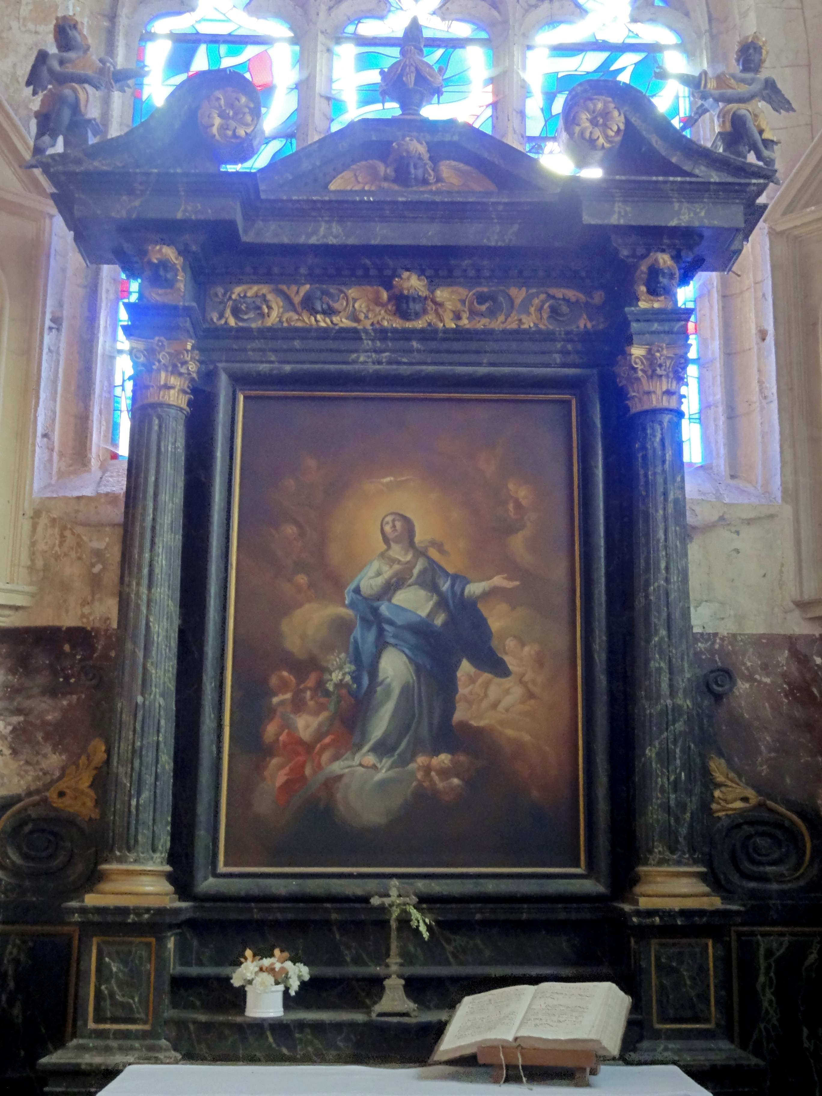 Mobilier de l'église Saint-Pierre-et-Saint-Paul (voir titre).